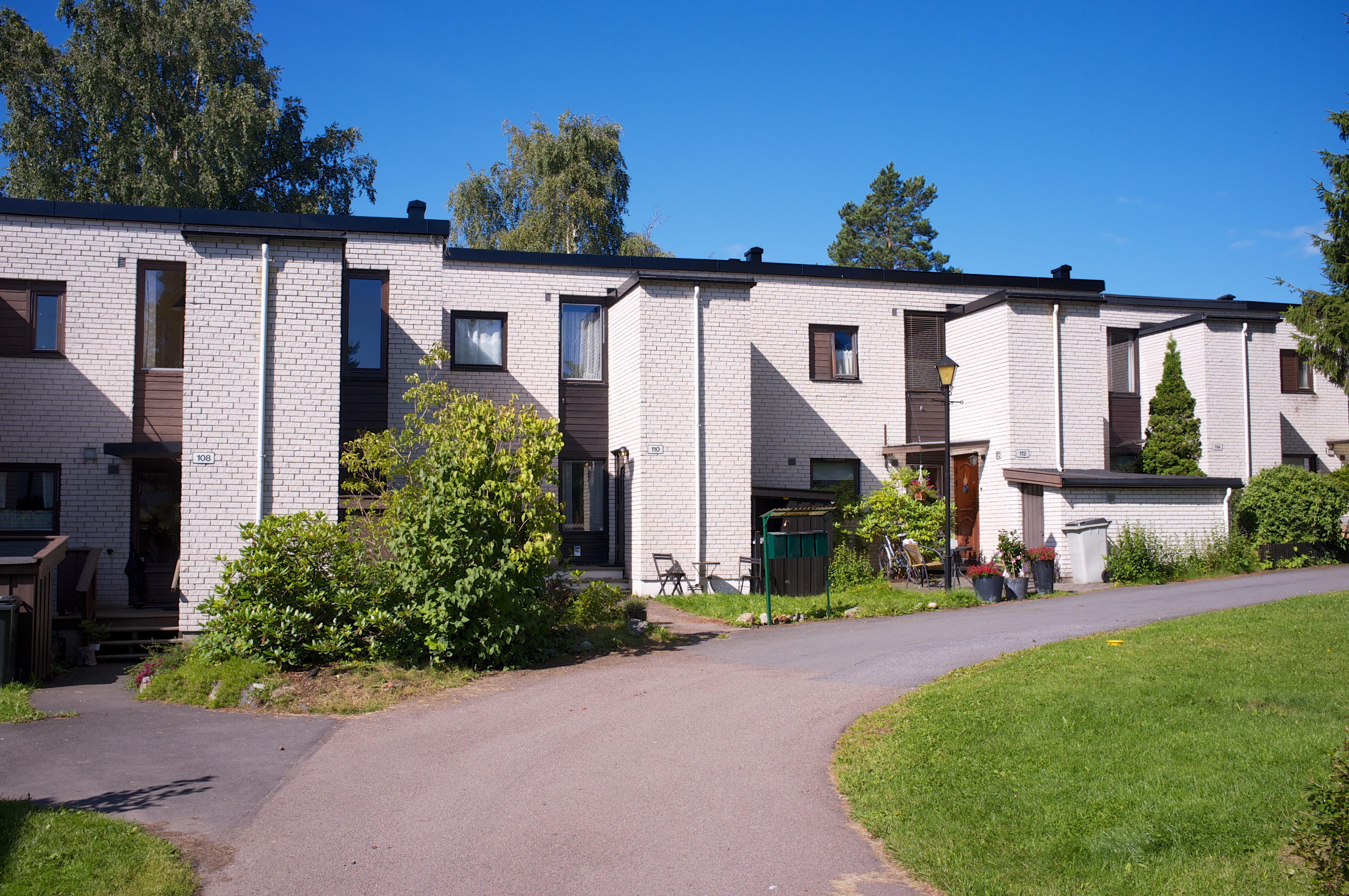 Fra Tveteråsen på Ulsrud i Oslo.